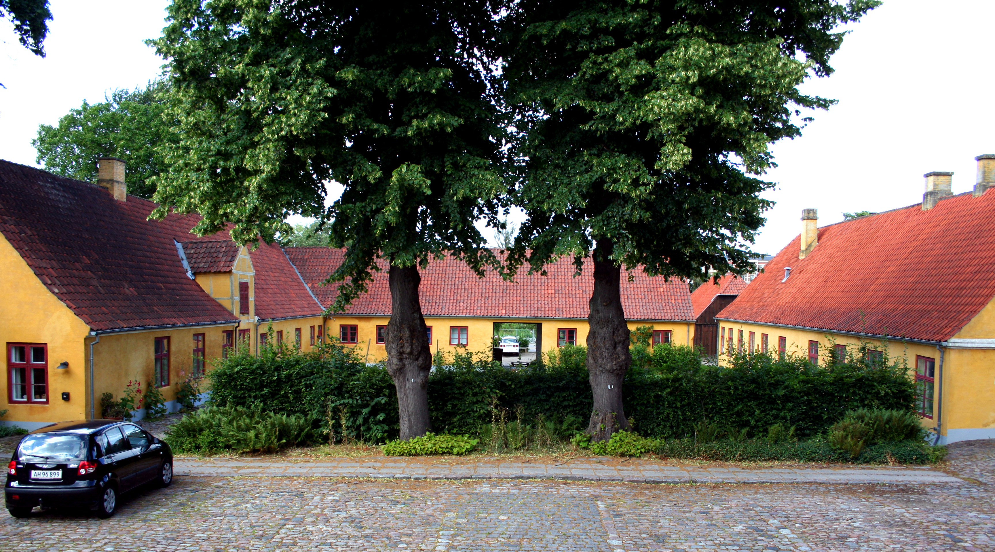 Gårdspladsen bag Villa Rolighed på Frederiksberg, bygget i 1770.